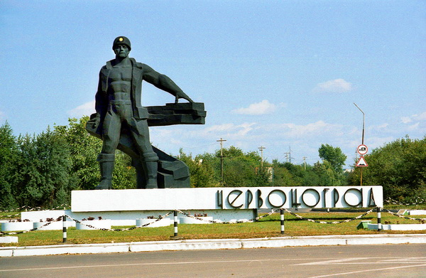 Шахтарям